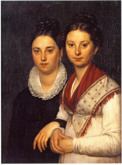 Портрет дочерей скульптора И. П. Мартоса: Веры Ивановны, жены художника А.Е.Егорова, и Софьи Ивановны (1798 - 1856), в замужестве за секретарем Академии художеств В.И.Григоровичем.